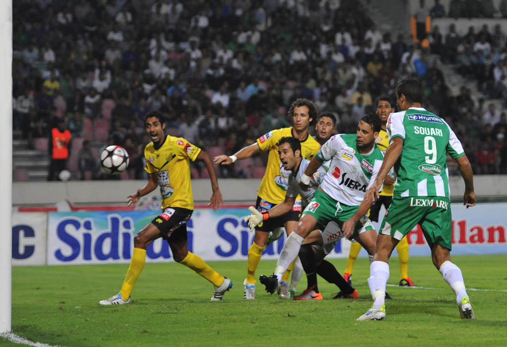 RCA vs MAS